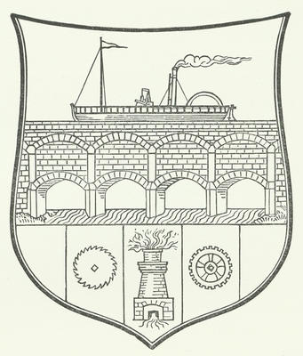 Wappen des Bezirks Maryhill in Glasgow/Schottland